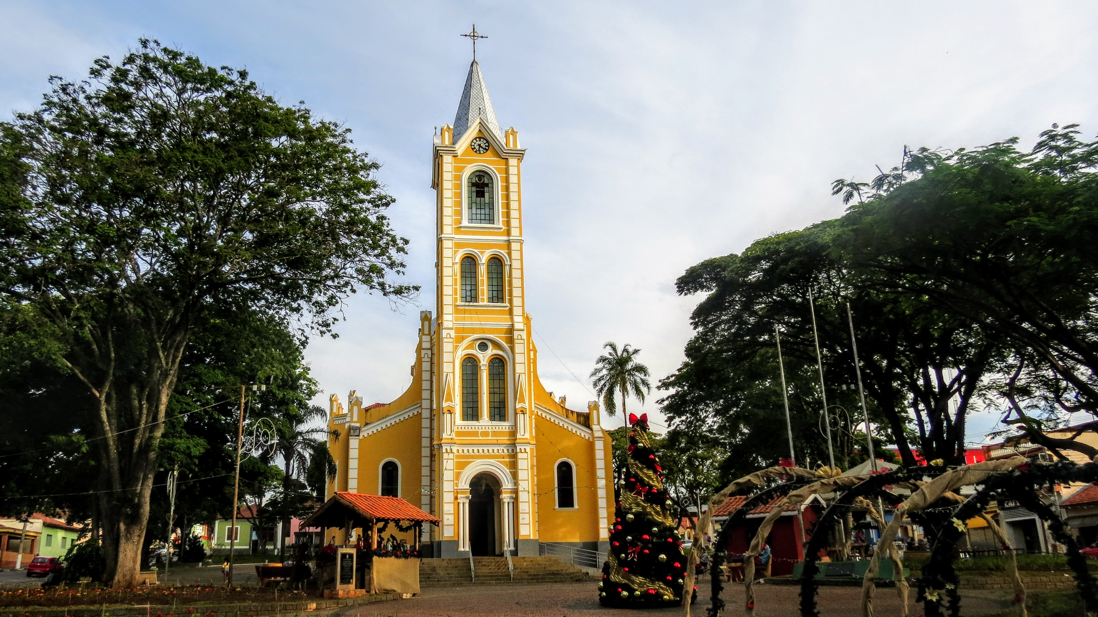 Praça central de Joanópolis, igreja matriz em destaque, com a decoração de Natal.